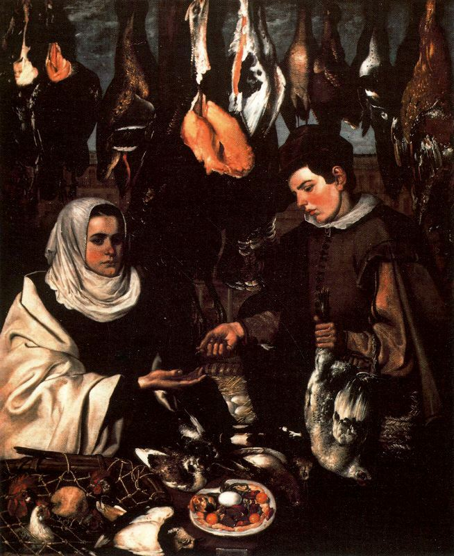 La Gallinera